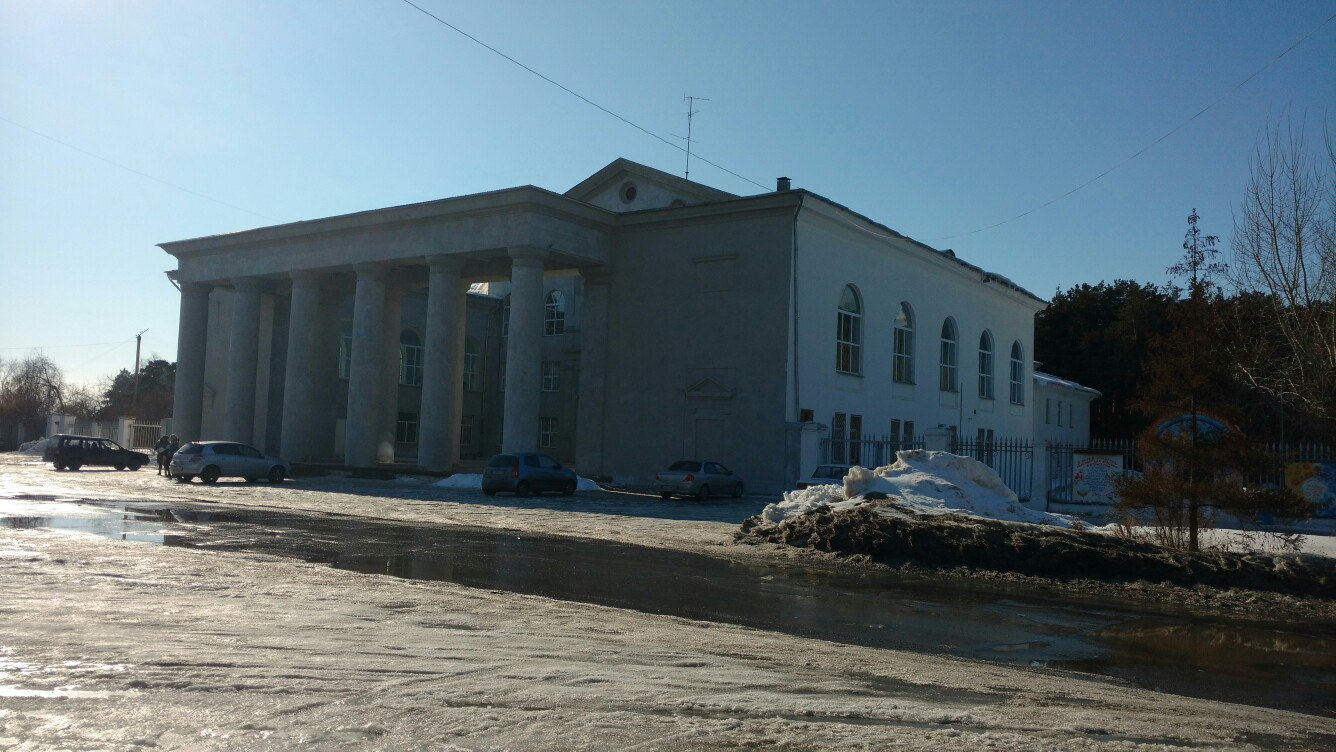 Южноуральский городской Дом культуры. Адрес: Челябинская обл., Южноуральск г., ул. Парковая, 2.